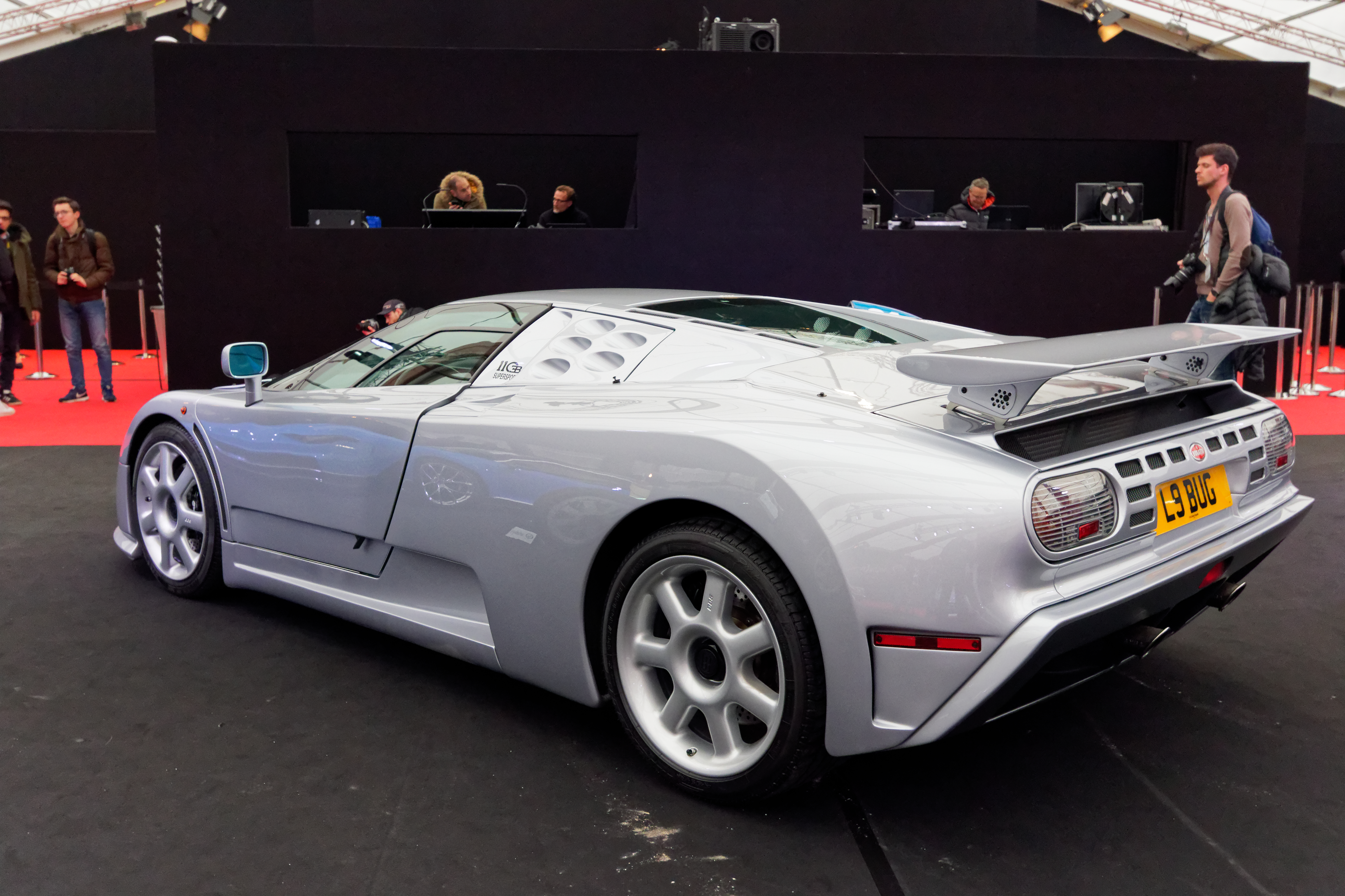 Un véhicule exposé lors de la vente RM Sotheby’s 2018 aux Invalides à Paris.